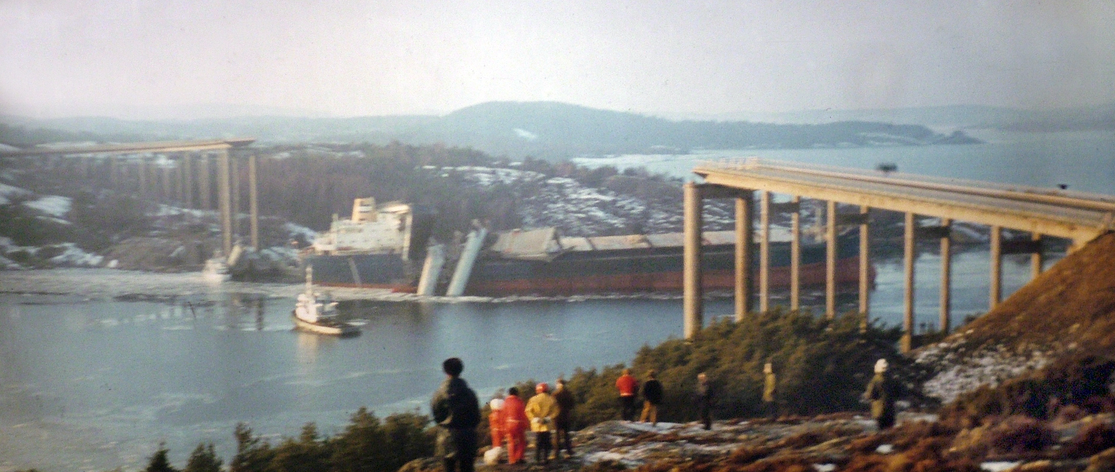 Fotat i från Källön / Stenungsund-sidan